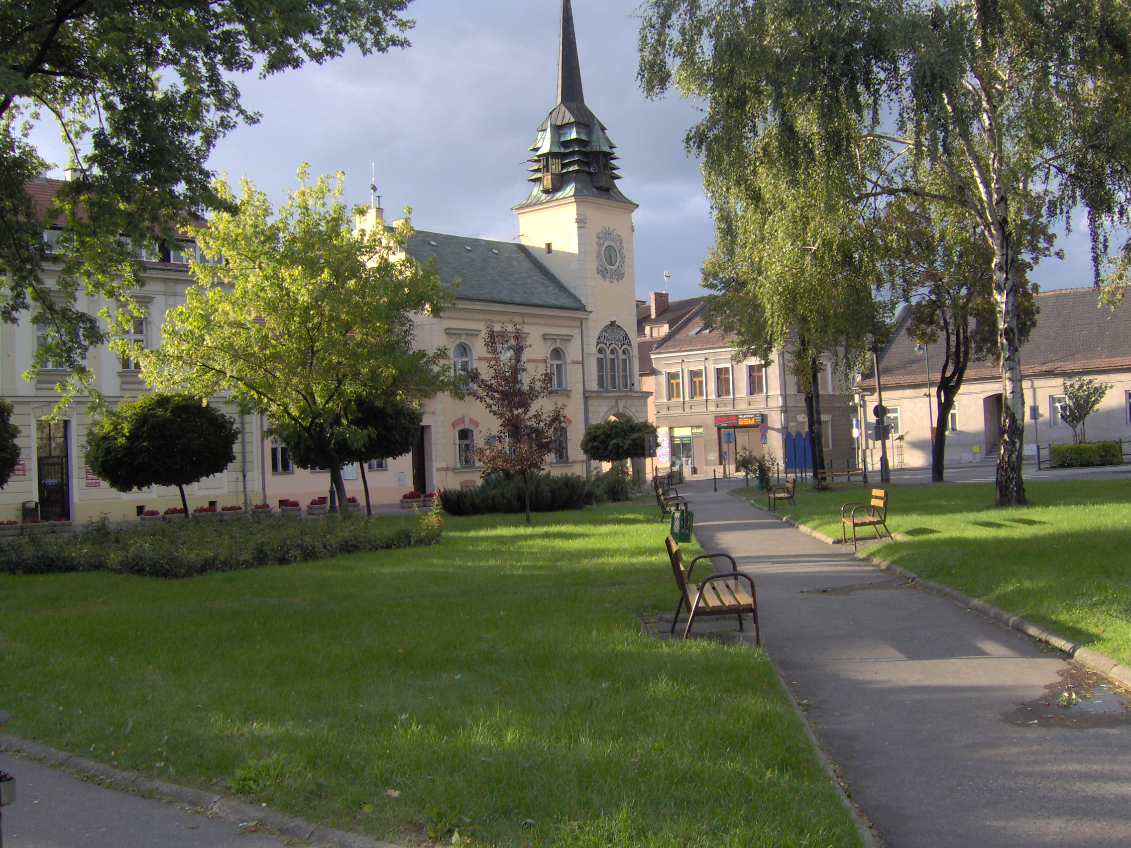 Ratusz w Skawinie